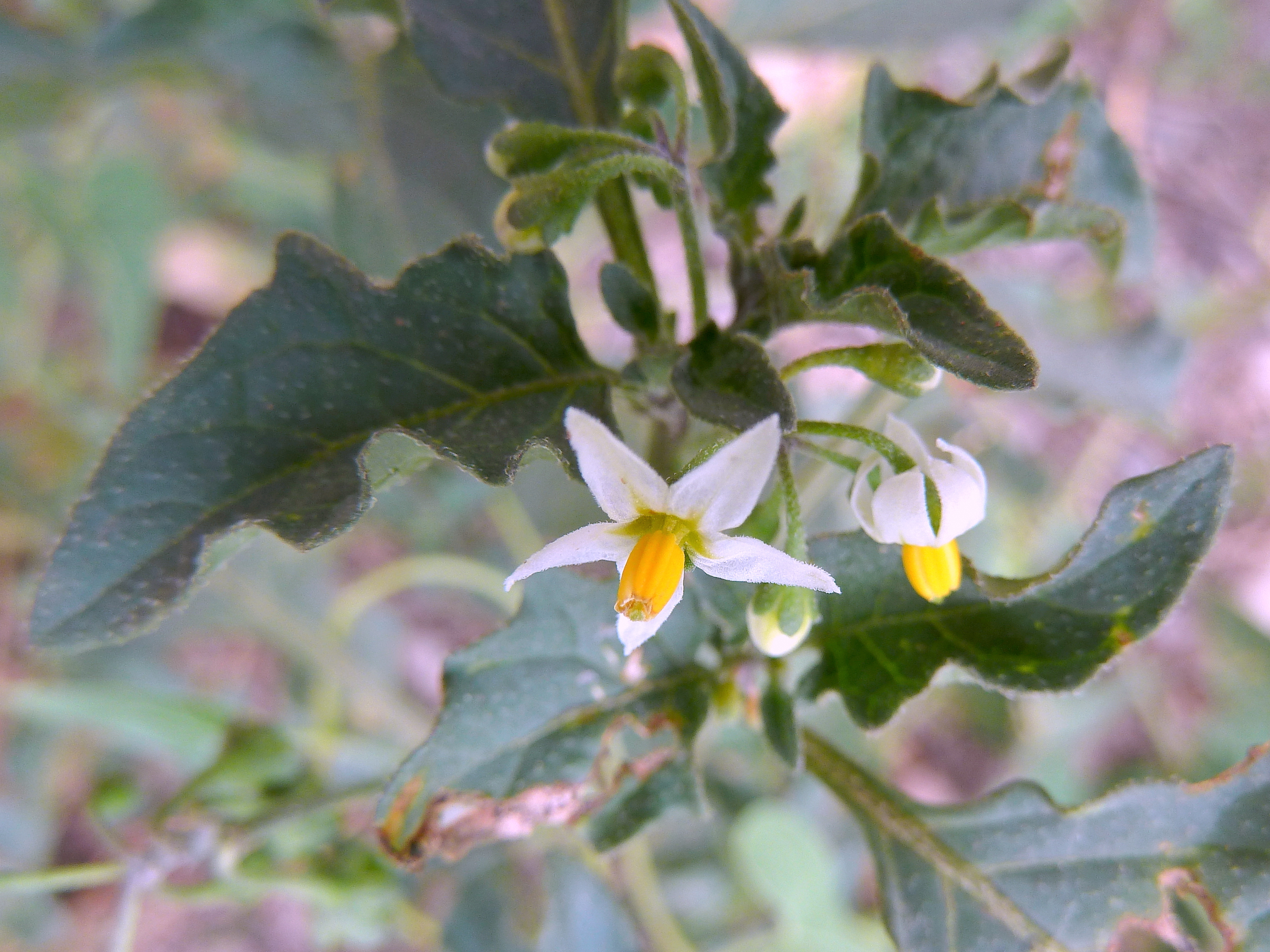 Solanum nigrum (Hierba Mora) : Inflorescencia con flores y botones - Camino de la Azarbe de Patricio, Albatera (Alicante, España).